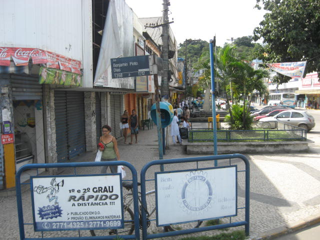 Centro de Belford Roxo